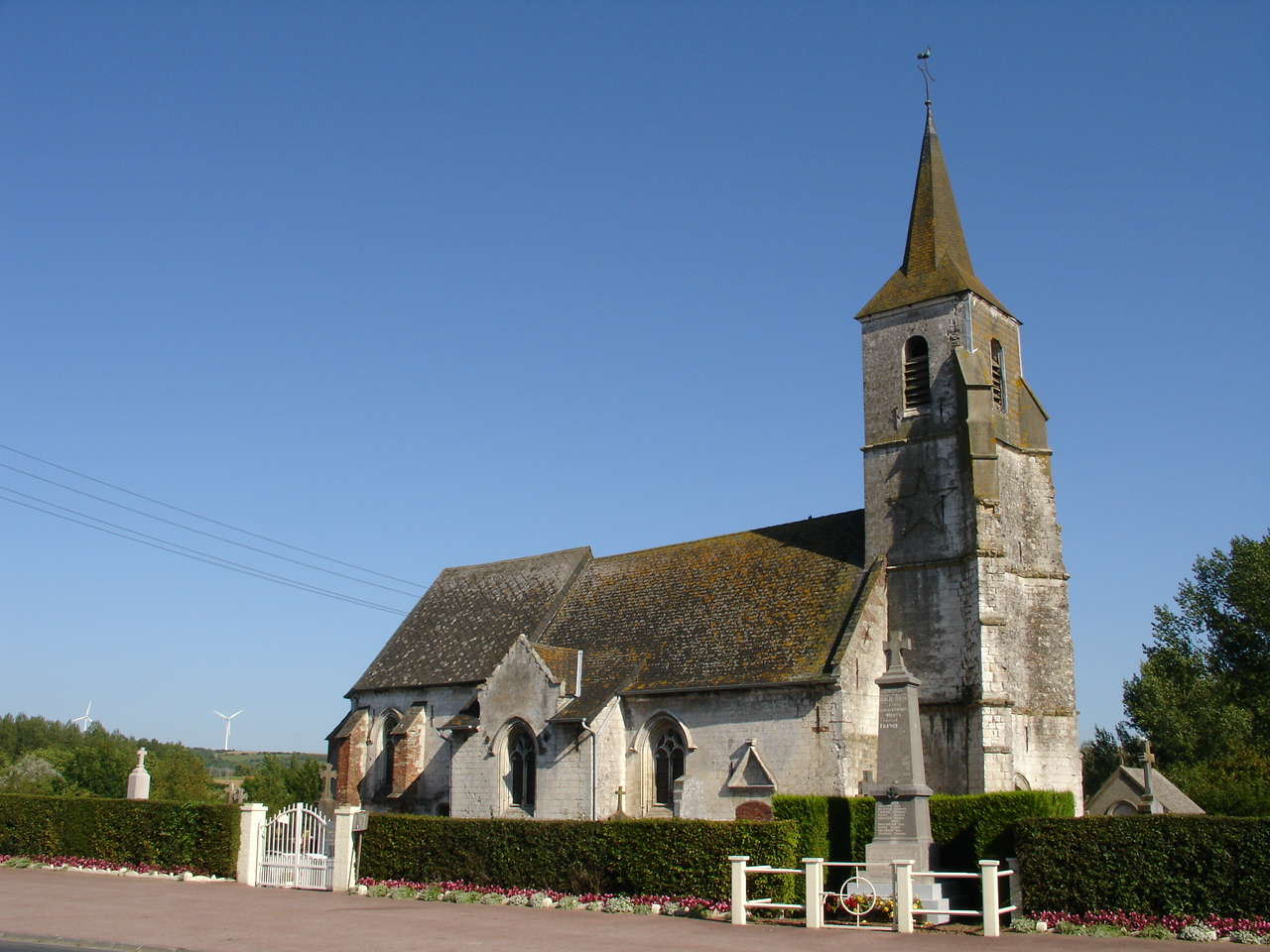 Église de Dennebrœucq